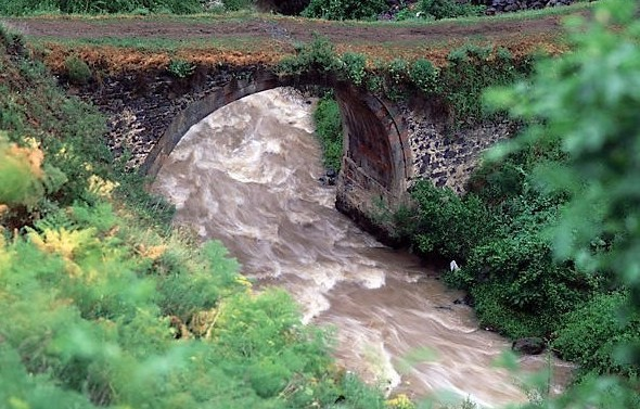 Мост 9го века на реке Азат